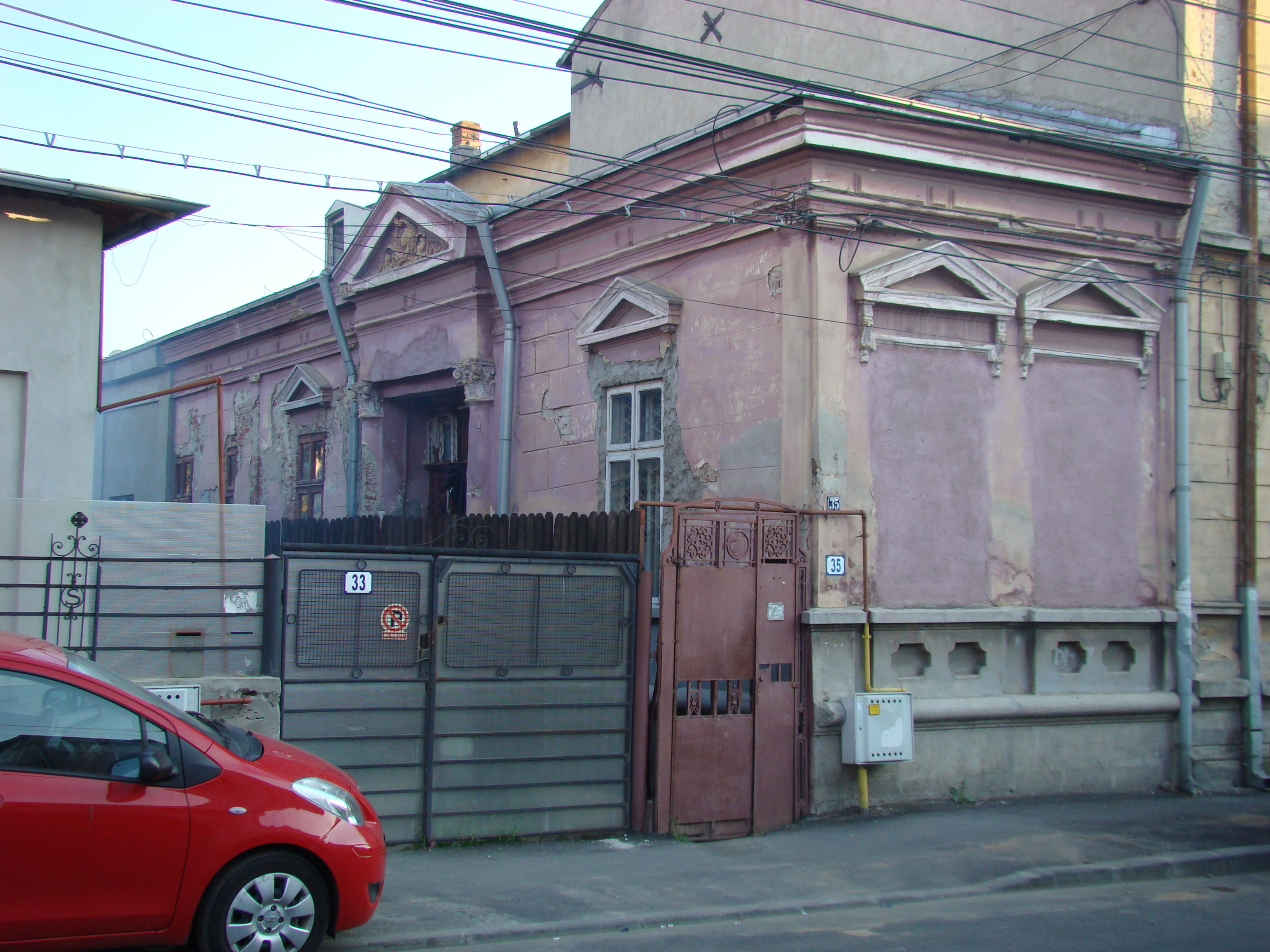 Clădire monument istoric, str. Mircea Vulcănescu, nr.35